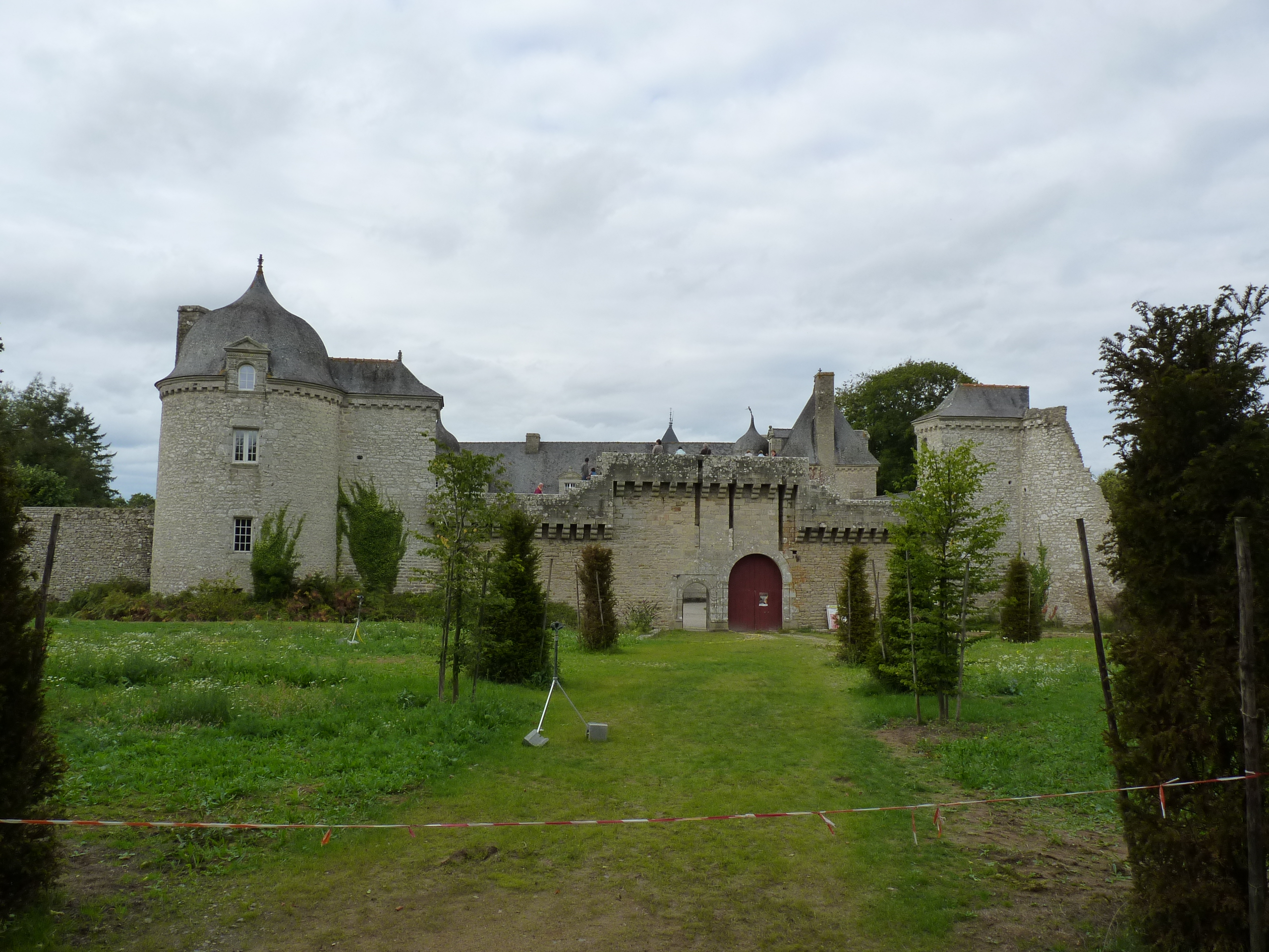 Château du 16ème-17ème siècle construit dans un style médiéval.